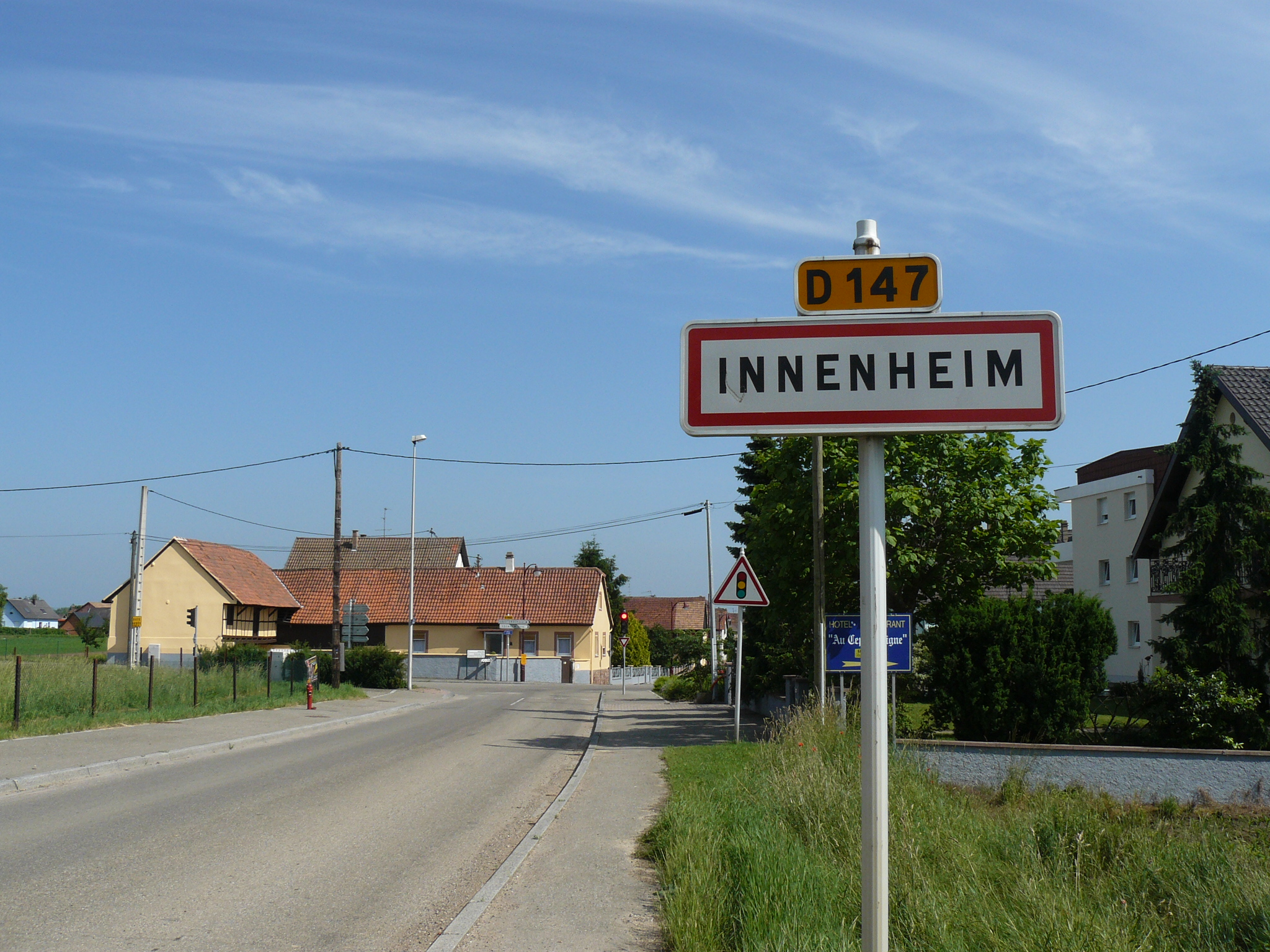 Entrée du village de Innenheim